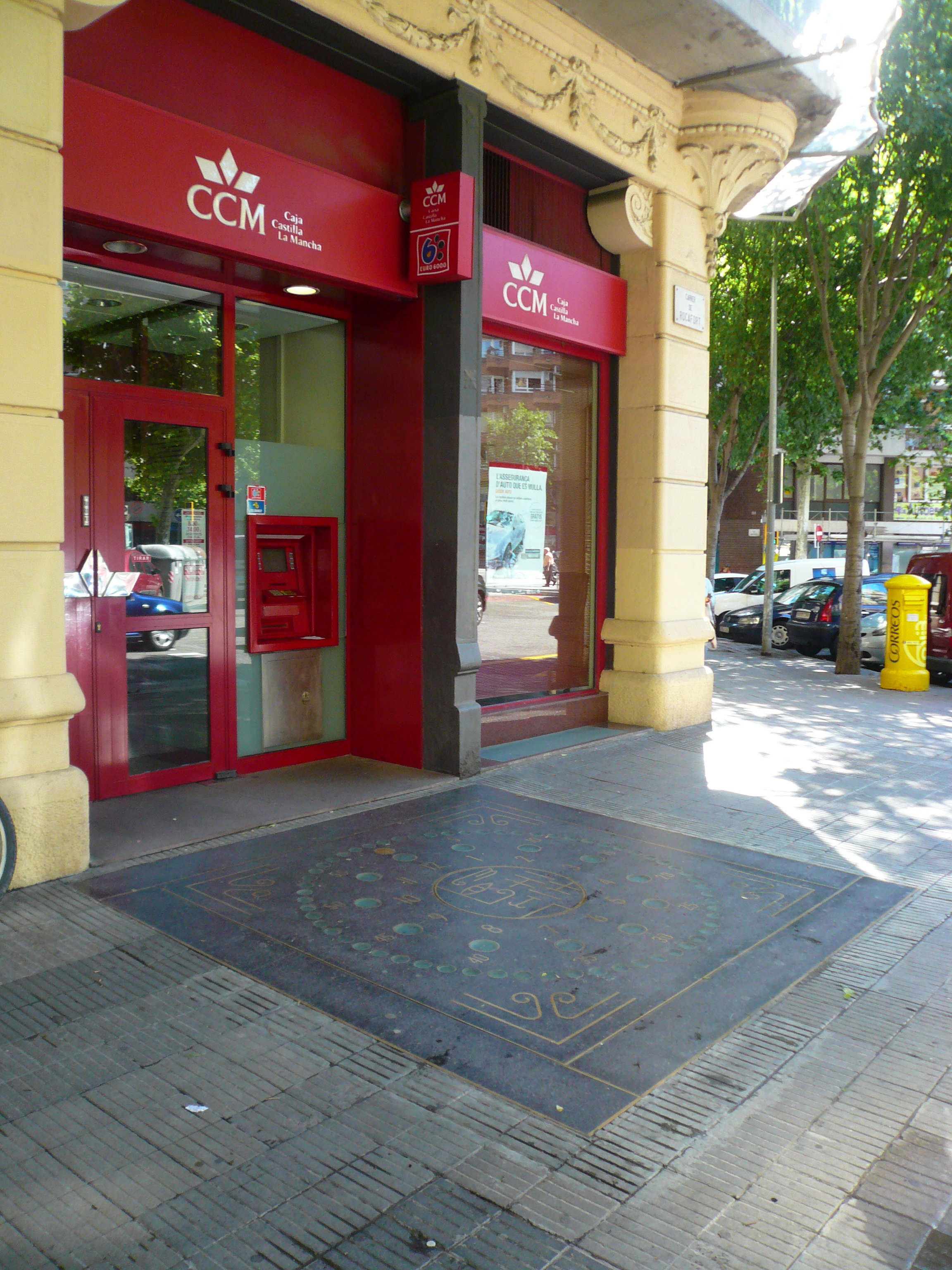 Rellotge lluminós. Rocafort, 2 (Barcelona). Disseny: Joan Cabrerizo. Material: terratzo i vidre amb incrustacions de llautó. 1935, restaurat 2005. 91″ N, 2° 09′ 30.71″ E